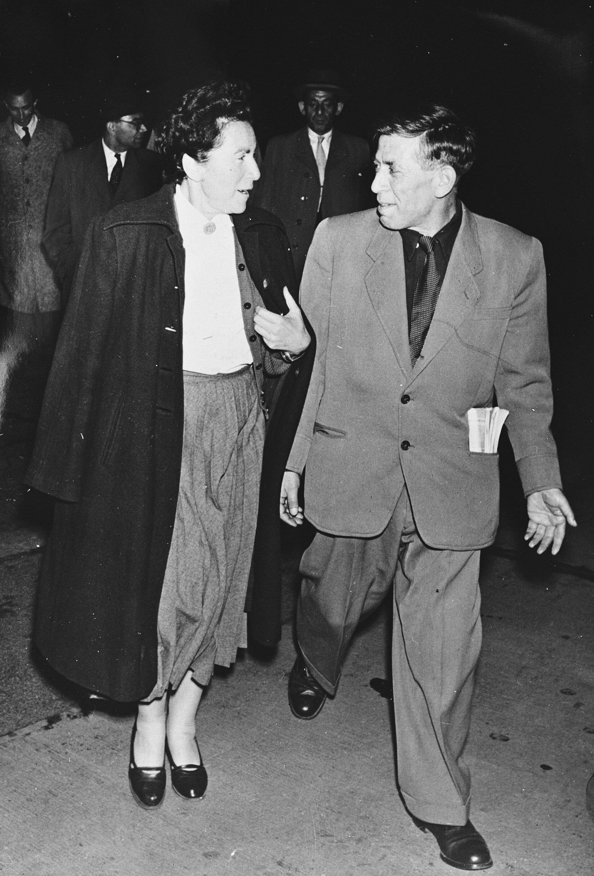 Collectie / Archief : Fotocollectie Anefo Reportage / Serie : [ onbekend ] Beschrijving : Israelische vakbondsbestuurder Mordechai Oren weer vrij Datum : 15 mei 1956 Fotograaf : Hartkamp, […] / Anefo Auteursrechthebbende : Nationaal Archief Materiaalsoort : Glasnegatief Nummer archiefinventaris : bekijk toegang 2.24.01.09 Bestanddeelnummer : 907-7626